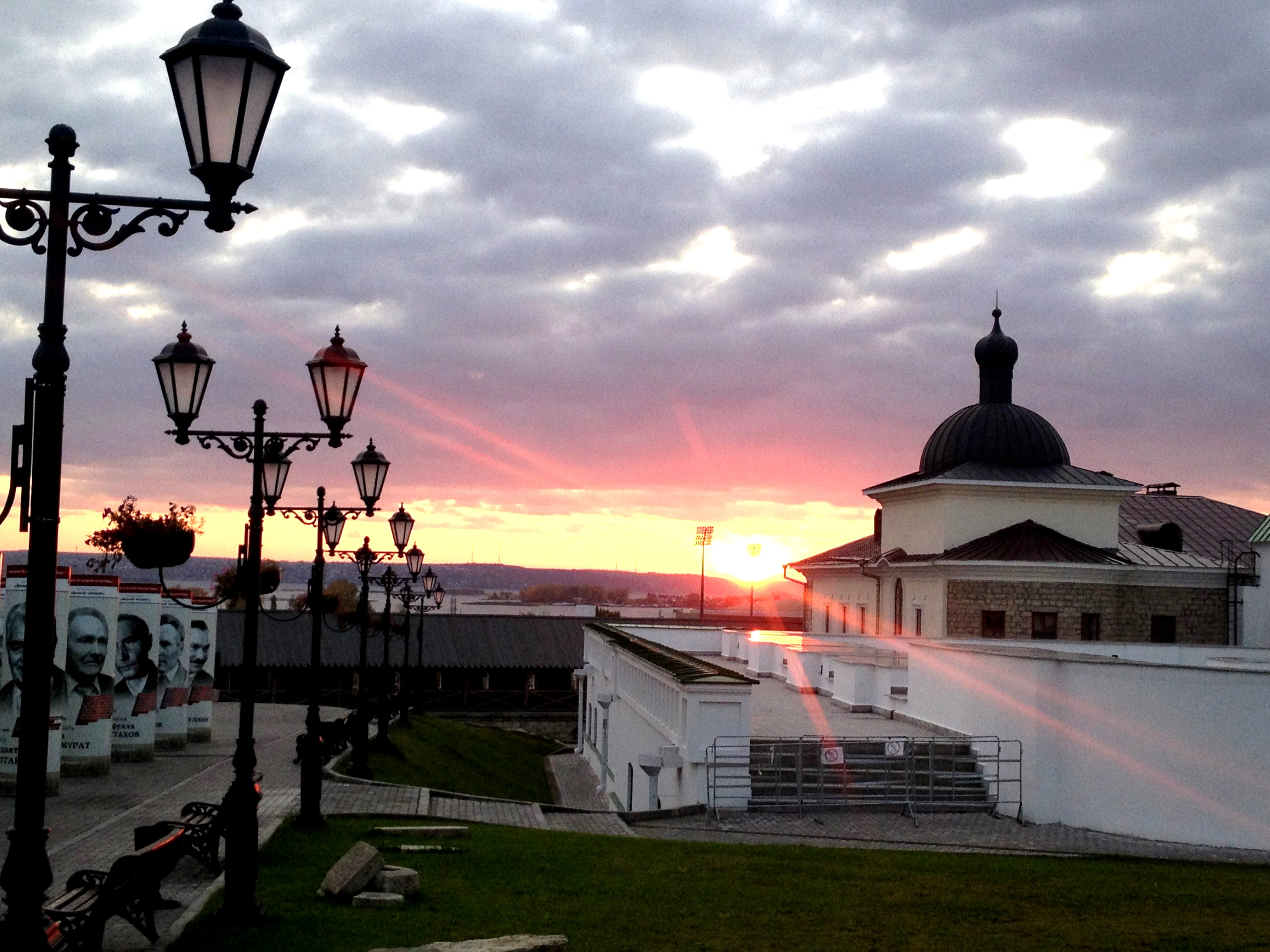 Бывший Спасо-Преображенский монастырь (г. Казань)